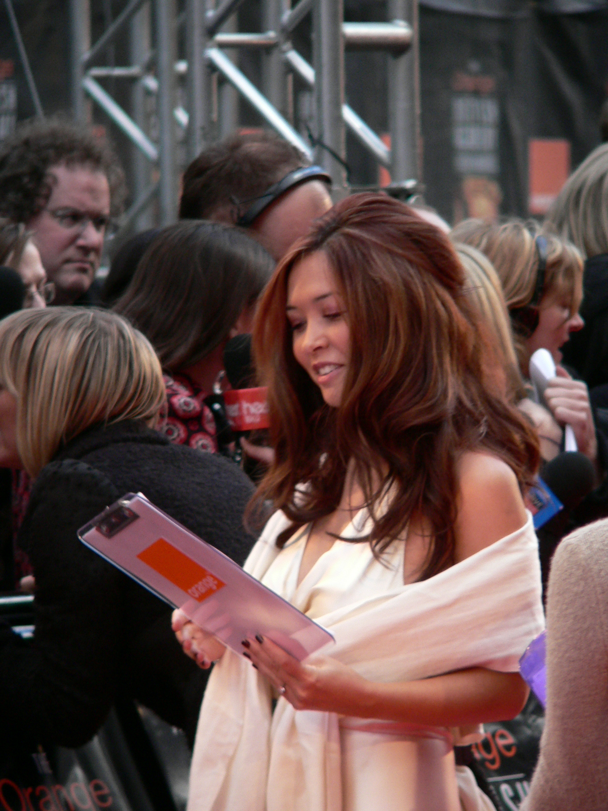 Myleene Klass